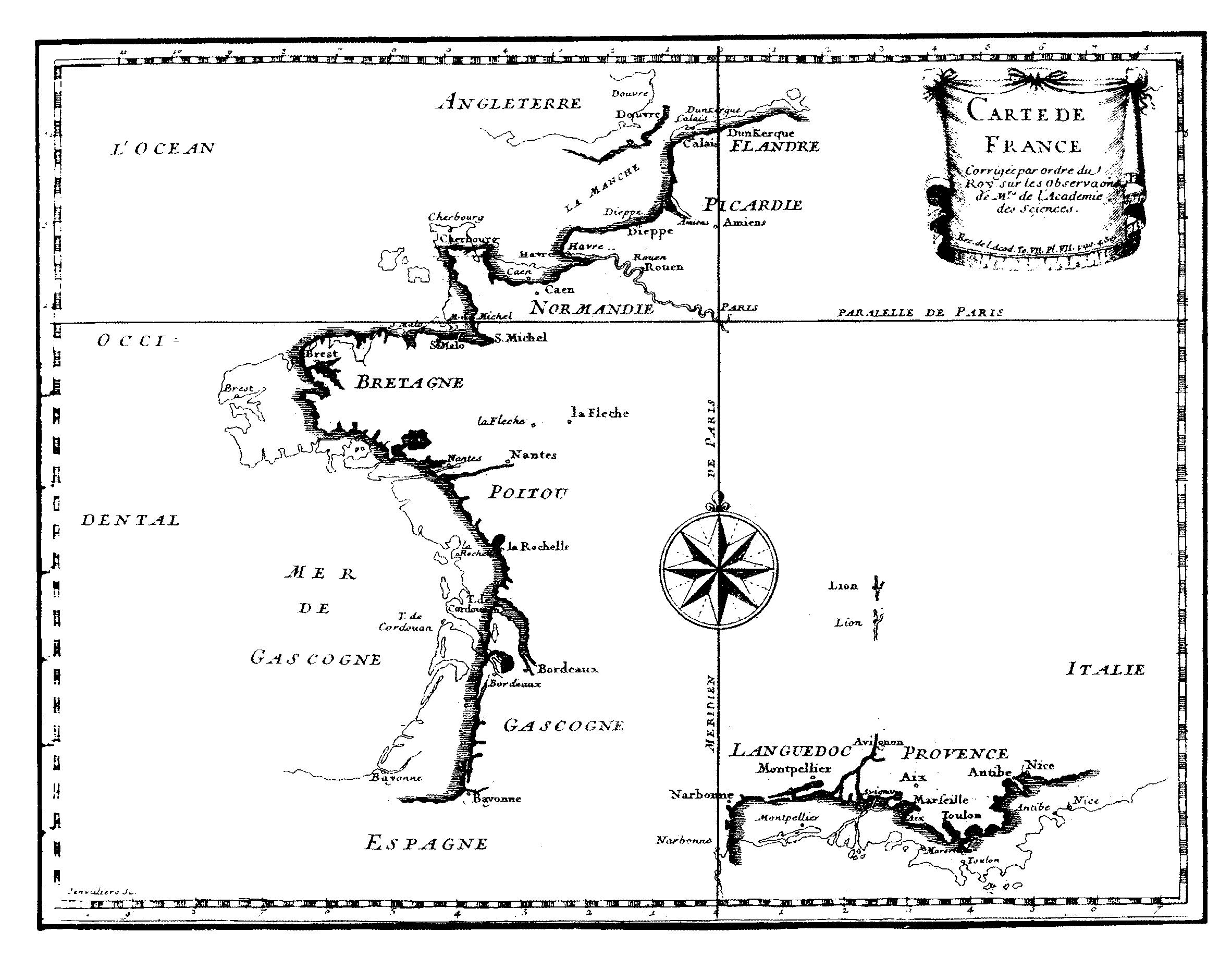 Carte de la France corrigée par Ordre du Roy sur les Observations de Messieurs de l'Académie des Sciences.